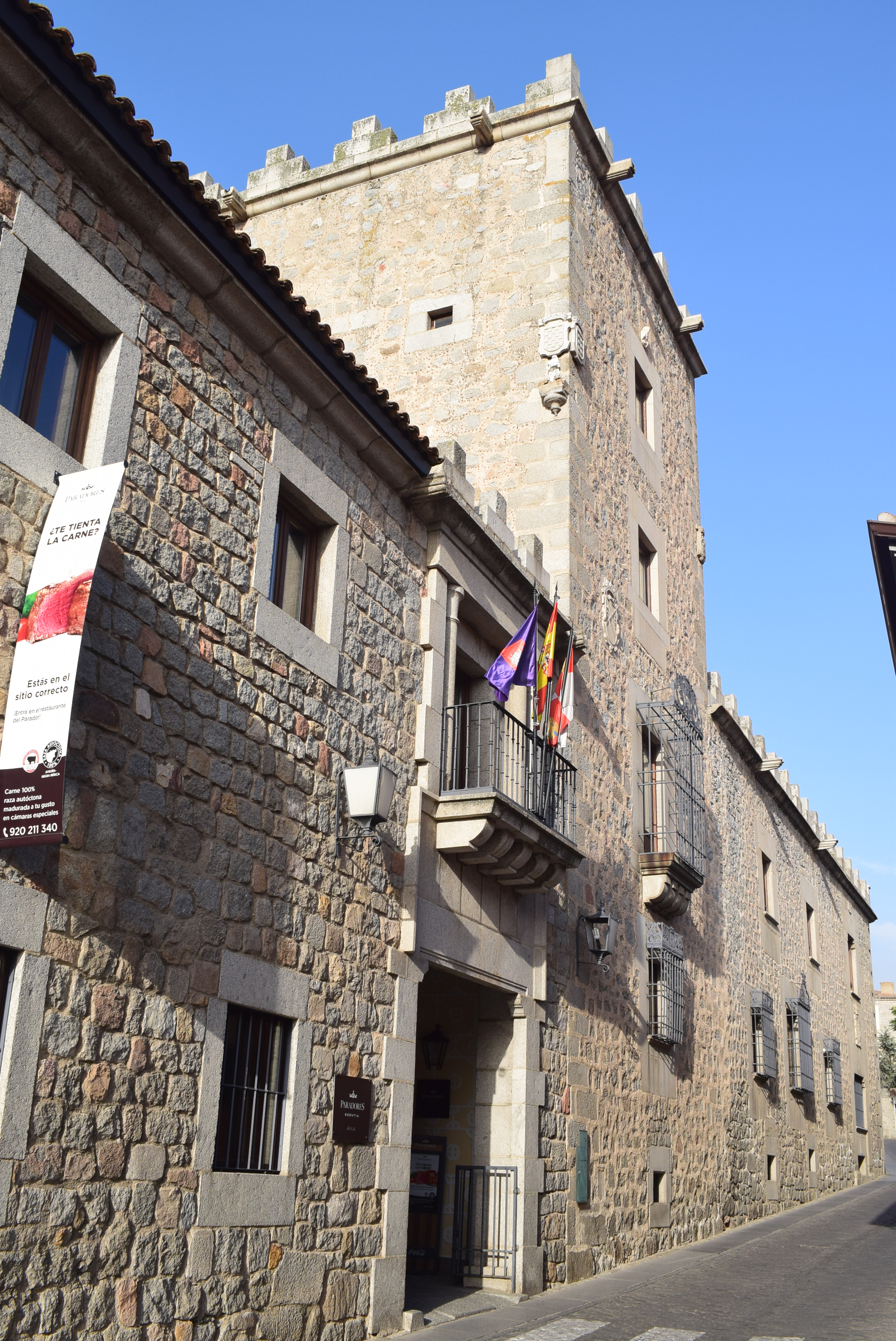 Palacio del Marqués de Benavites con el torreo construido por don Bernardino de Melgar y Abreu para hospedar su museo sobre la tauromaquia y Santa Teresa de Jesús. La construcción a la izquierda de la entrada fue añadida en el siglo XX cuando fue adquirida por Paradores de Turismo.